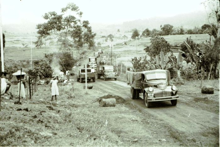 negatief. Een kolonne vrachtwagens van het Nederlandse leger